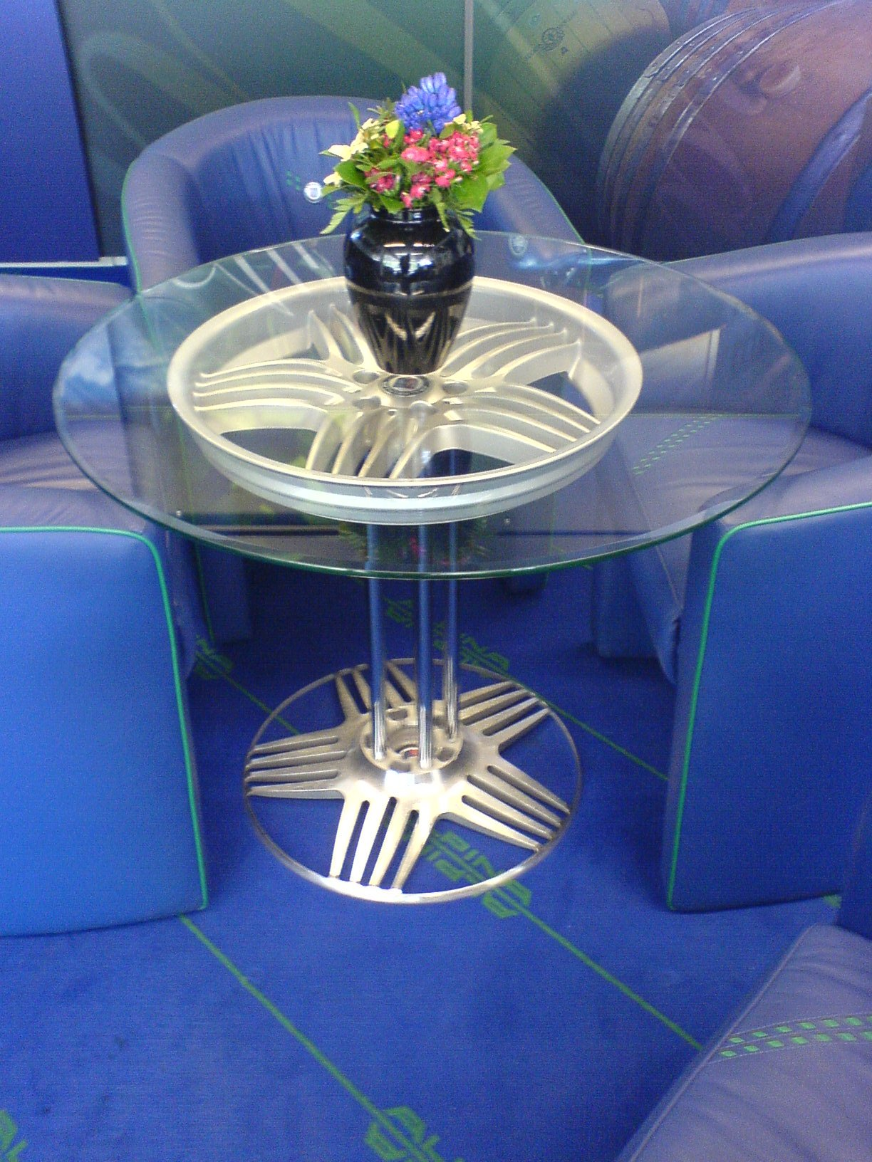 Runder Tisch mit BMW Alpina-Felgen für Verkaufsgespräche, BMW-Niederlassung München — Innenstadt, I. OG DSC00945.JPG